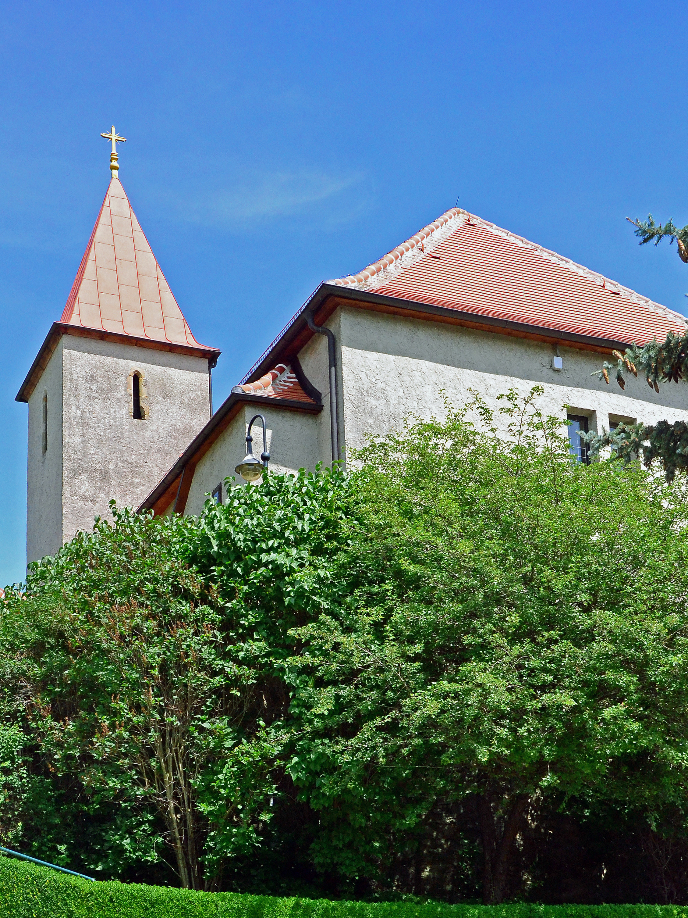 Kath. Pfarrkirche hl. Ägidius in Chorherren bei Tulbing NÖ